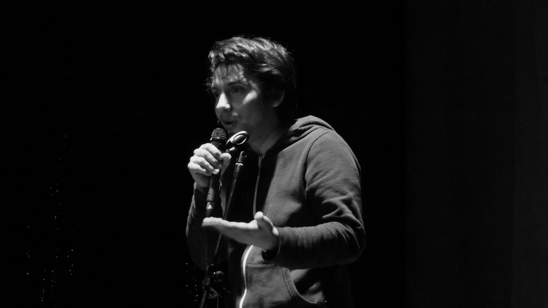 Fabrizio Copano en una presentación.